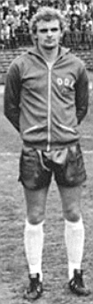 Title: Rostock, DDR-Nachwuchs wurde Vize-Europameister Factual corrections and alternative descriptions are encouraged separately from the original description. Additionally errors can be reported at this page to inform the Bundesarchiv. Original historic description: ADN-ZB-Kaufhold-6.6.80-zin-Rostock: DDR-Nachwuchs wurde Vize-Europameister. In den beiden Endspielen um die V. Nachwuchs-Europameisterschaft im Fußball erreichte die DDR-Elf gegen die UdSSR ein 0:0 (7.5. Rostock) und ein 0:1 (21.5. Moskau) und wurde damit zum dritten Mal nach 1974 und 1978 Vize-Europameister. Im ersten Finalspiel am 7.5. in Rostock trat die DDR-Vertretung in folgender Besetzung an: Lothar Kurbjuweit, Rene Müller, Thomas Dennstedt, Bernd Schulz, Rainer Troppa, Artur Ullrich, Ralf Strässer, Ronald Kreer, Jürgen Raab, Jürgen Utess, Thomas Töpfer (v.l.n.r.).